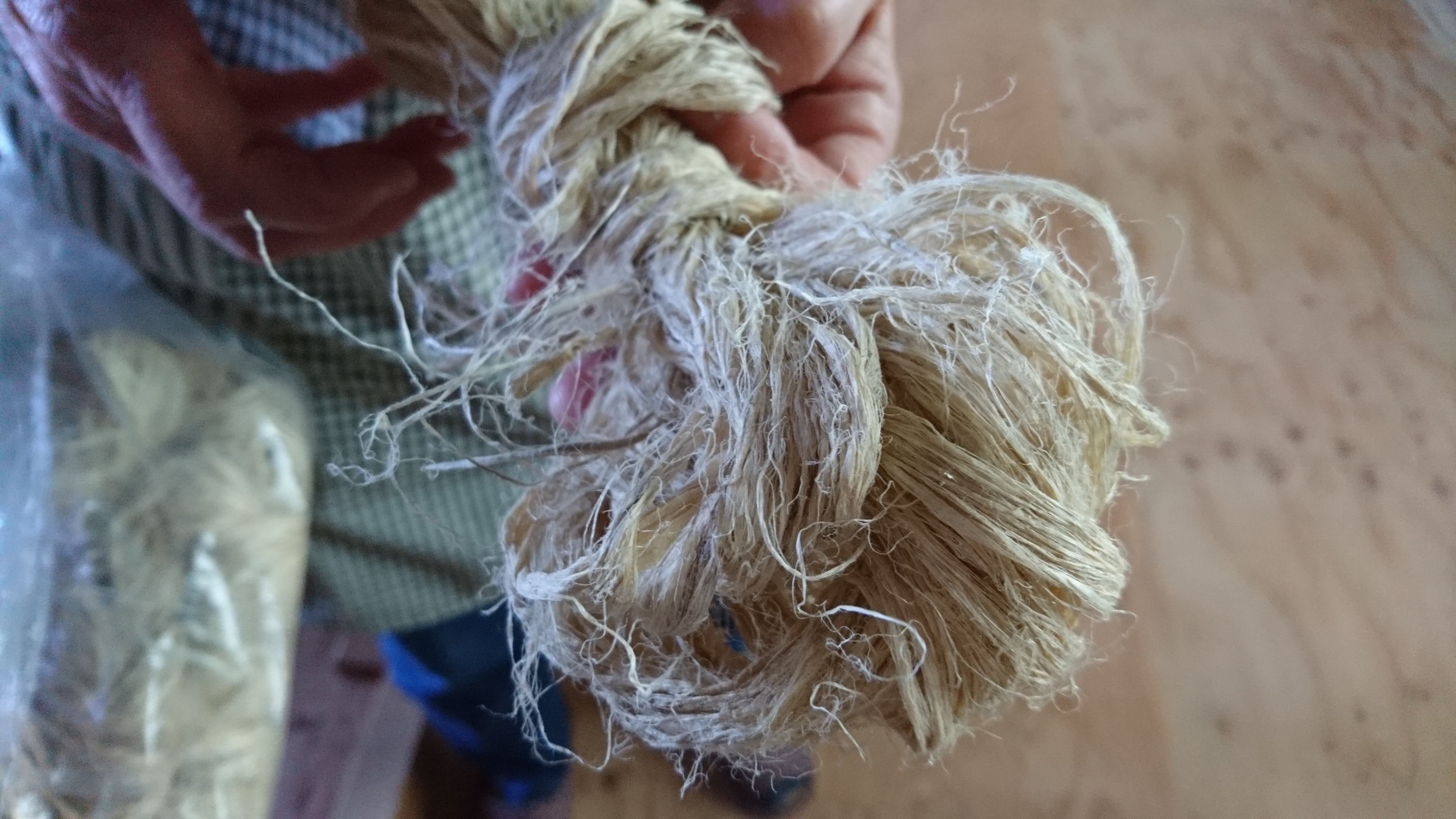 藤織りの原材料である藤蔓の中皮部分のノシイレ工程後、乾燥させたもの。